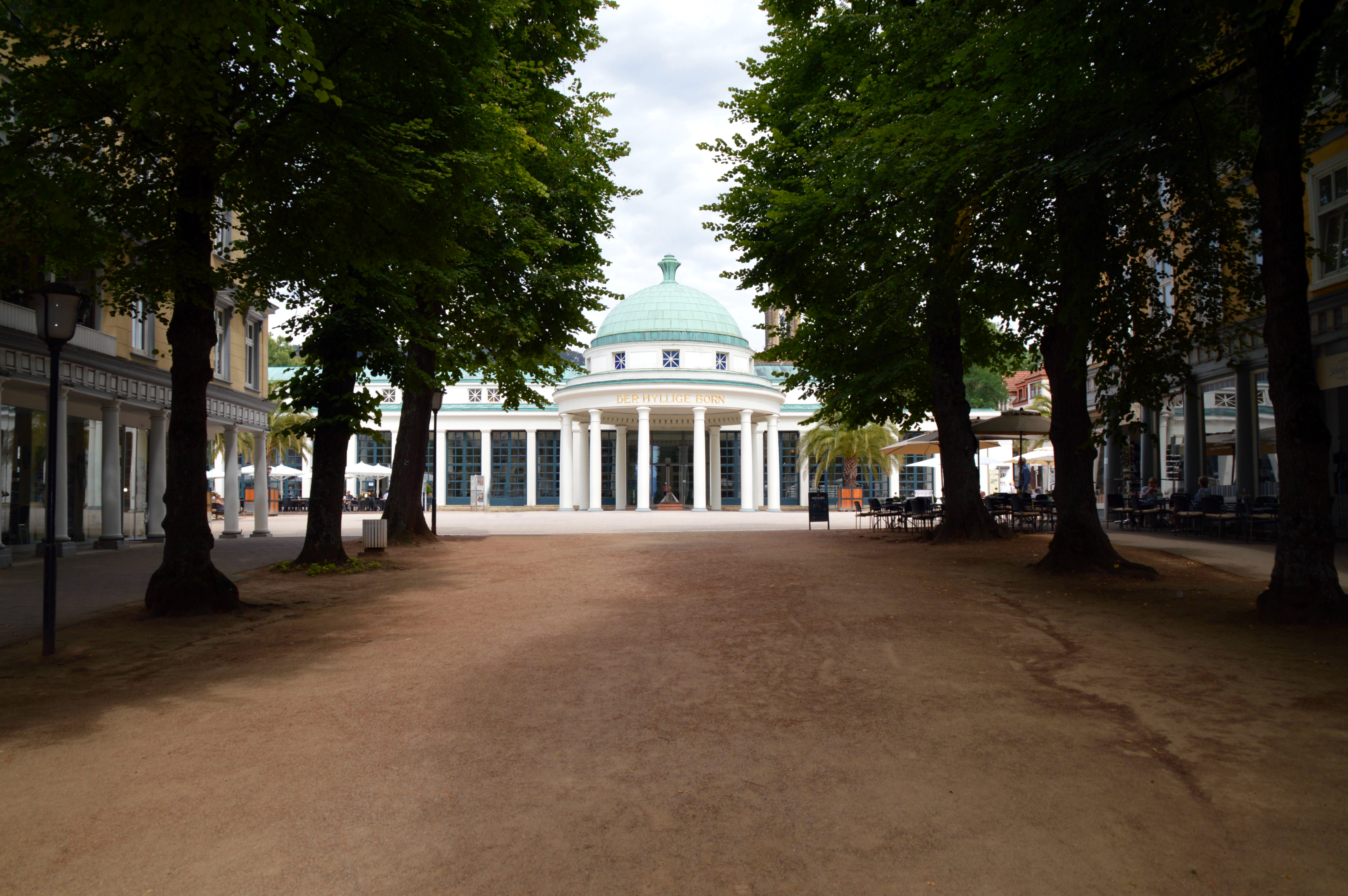 Bad Pyrmont Hylligen Born Heilige bron Holy source fountain Avenue Hauptallee